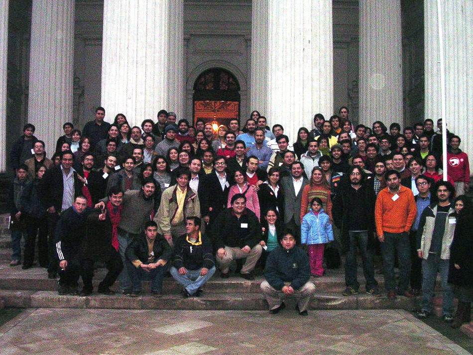 Foto del IV Congreso de la JR. Chile